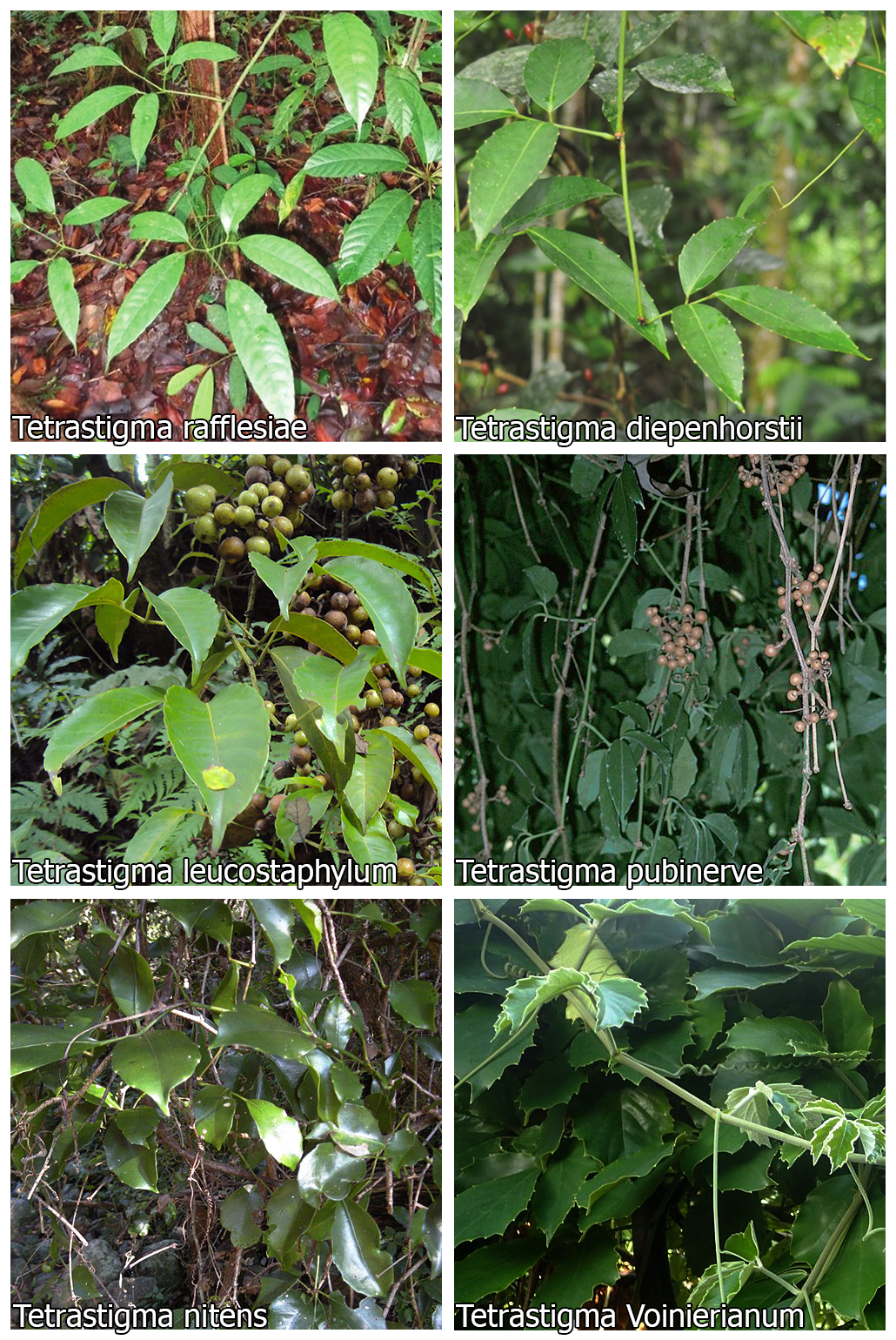 Poster de diverses espèces de Tetrastigma. Composé à partir des images suivantes : File:Tetrastigma_diepenhorstii.png File:Tetrastigma_rafflesiae.png File:Tetrastigma_leucostaphylum_06.JPG File:Starr-000530-1267-Tetrastigma_pubinerve-fruit_and_leaves-Honokahau_Valley-Maui_(24161011599).jpg File:Tetrastigma_nitens.jpg File:Tetrastigma_voinierianum_kz1.jpg